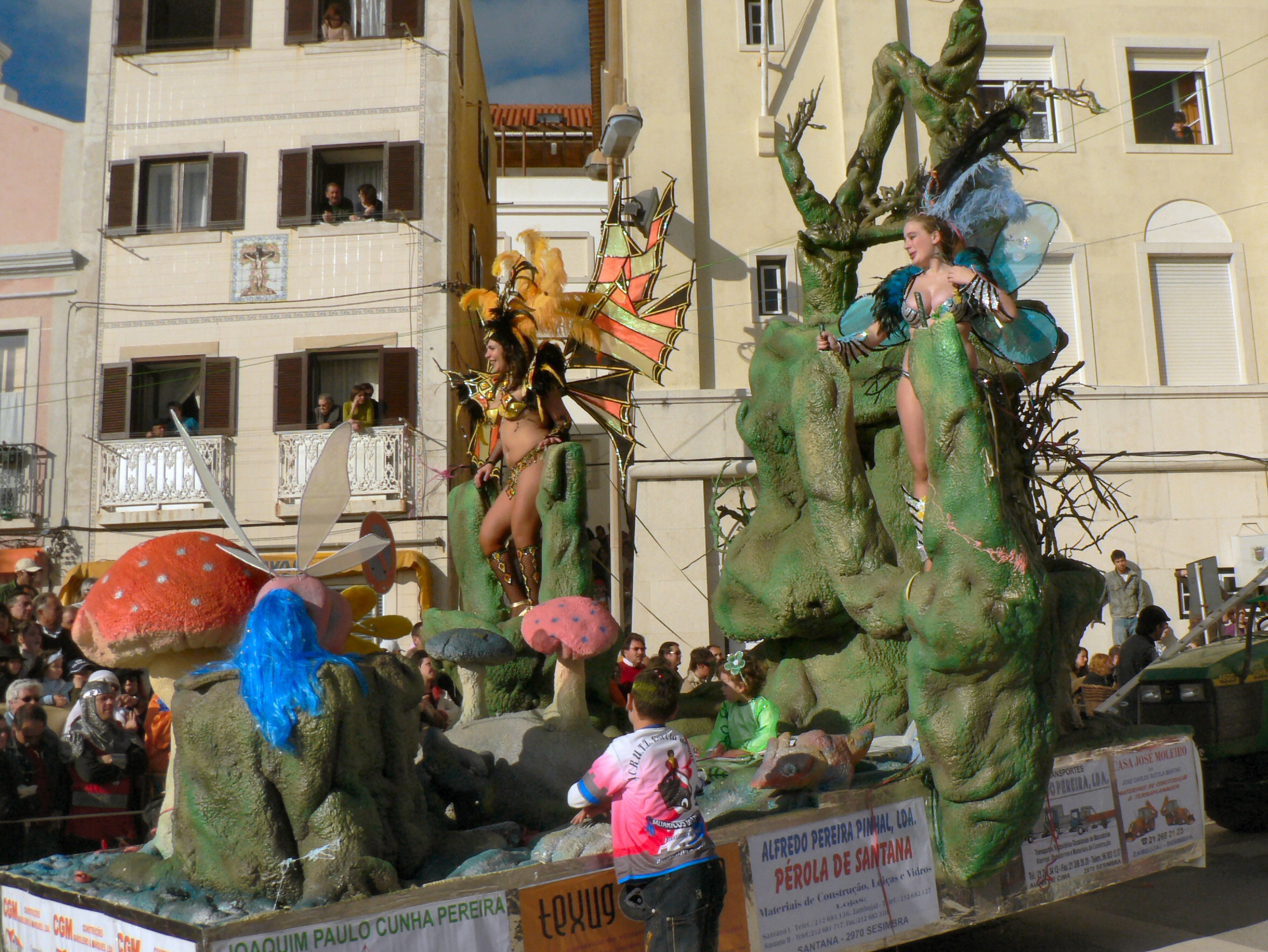 Desfile de Carnaval em Sesimbra 2007